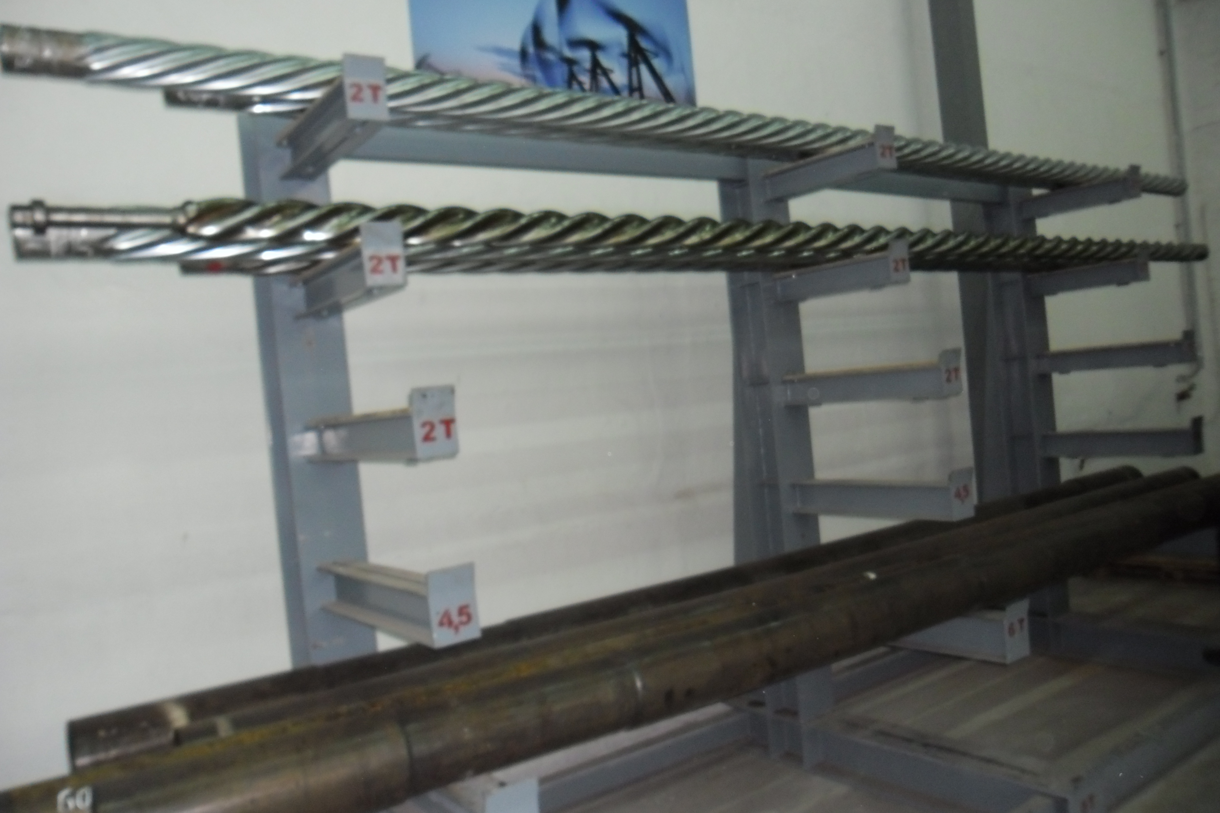 Фото